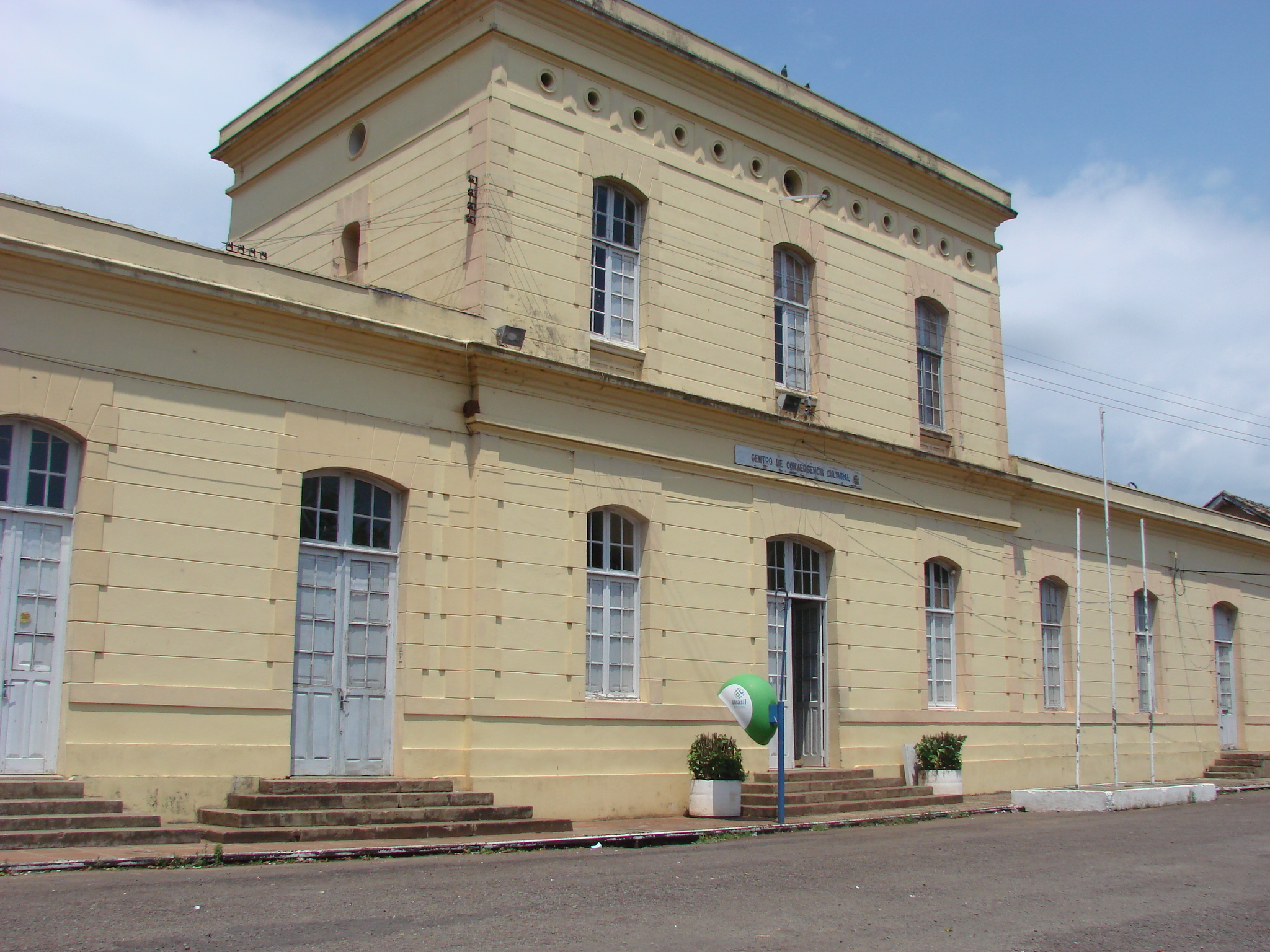 Avenida General Câmara em Cruz Alta